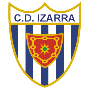 Escudo CD Izarra 2009